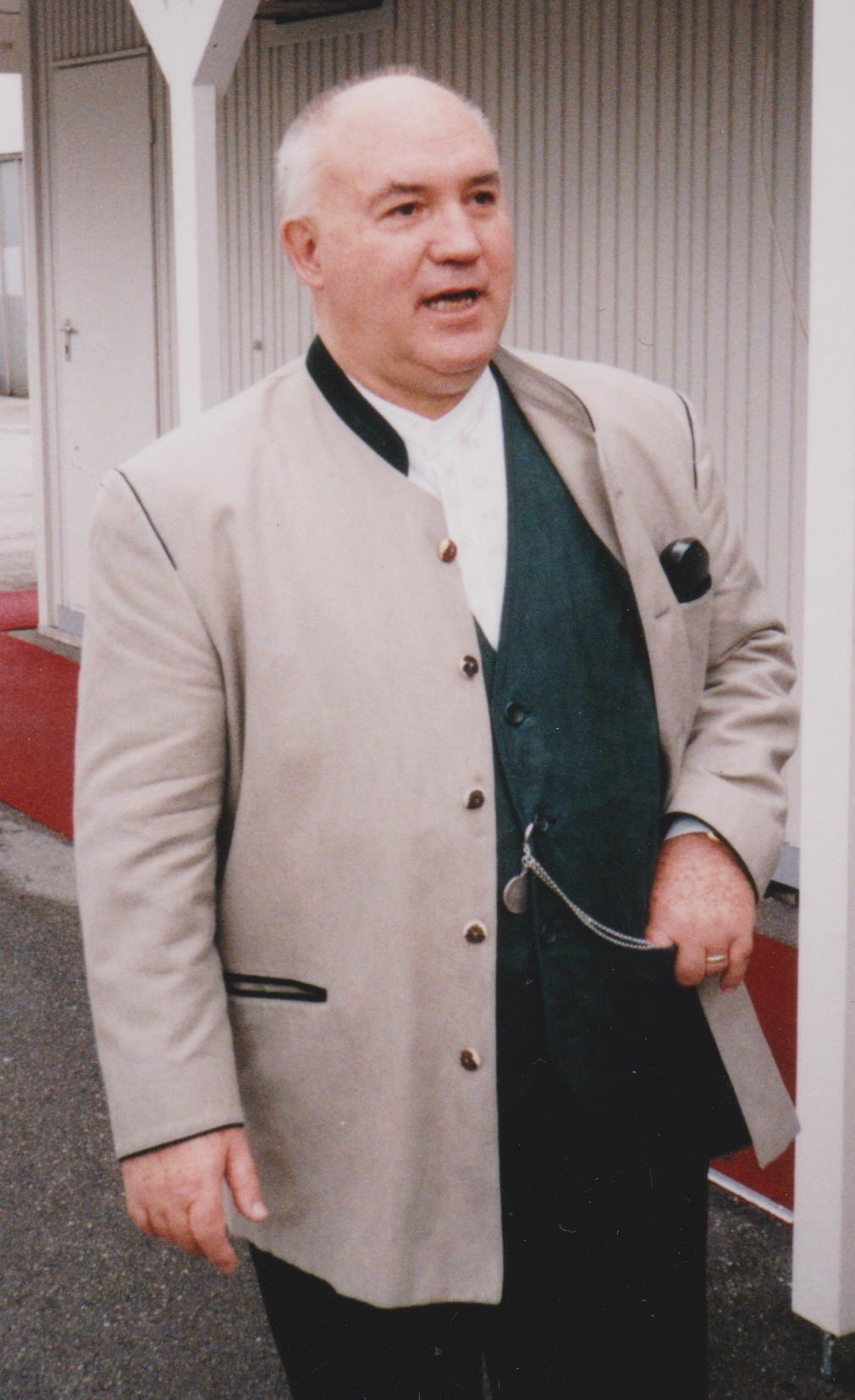 ZDF Streit um Drei 1999